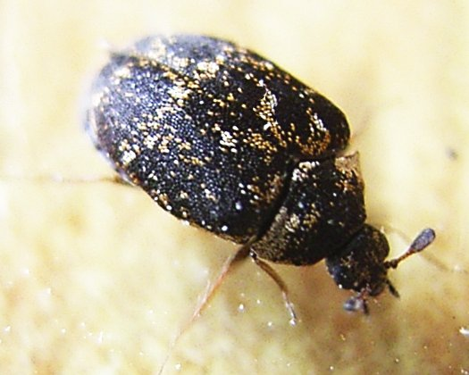 Anthrenus museorum male